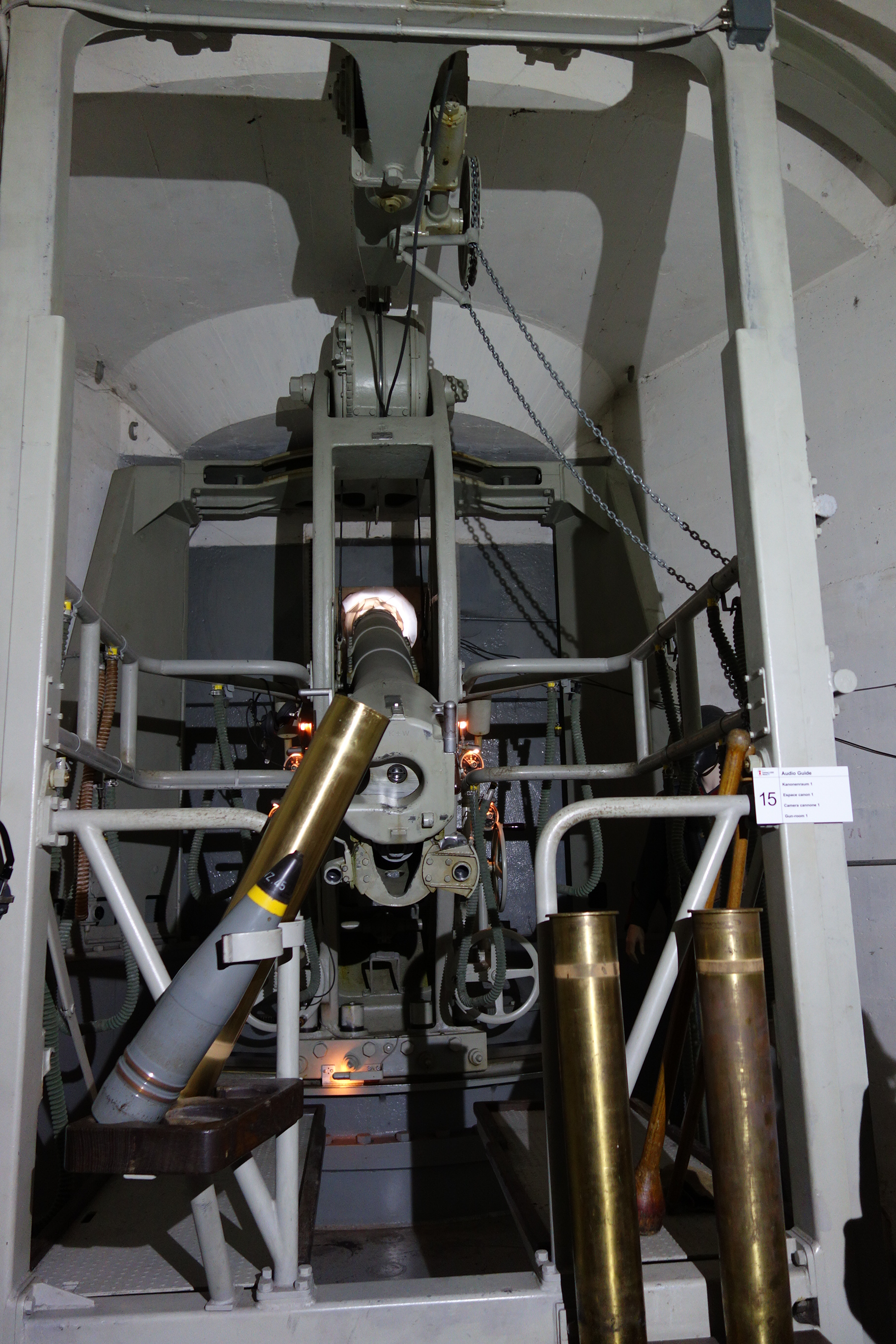 Artilleriewerk Mühlefluh, Vitznau LU, Schweiz